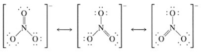 Nitraatti-ionin Lewis-rakenteet